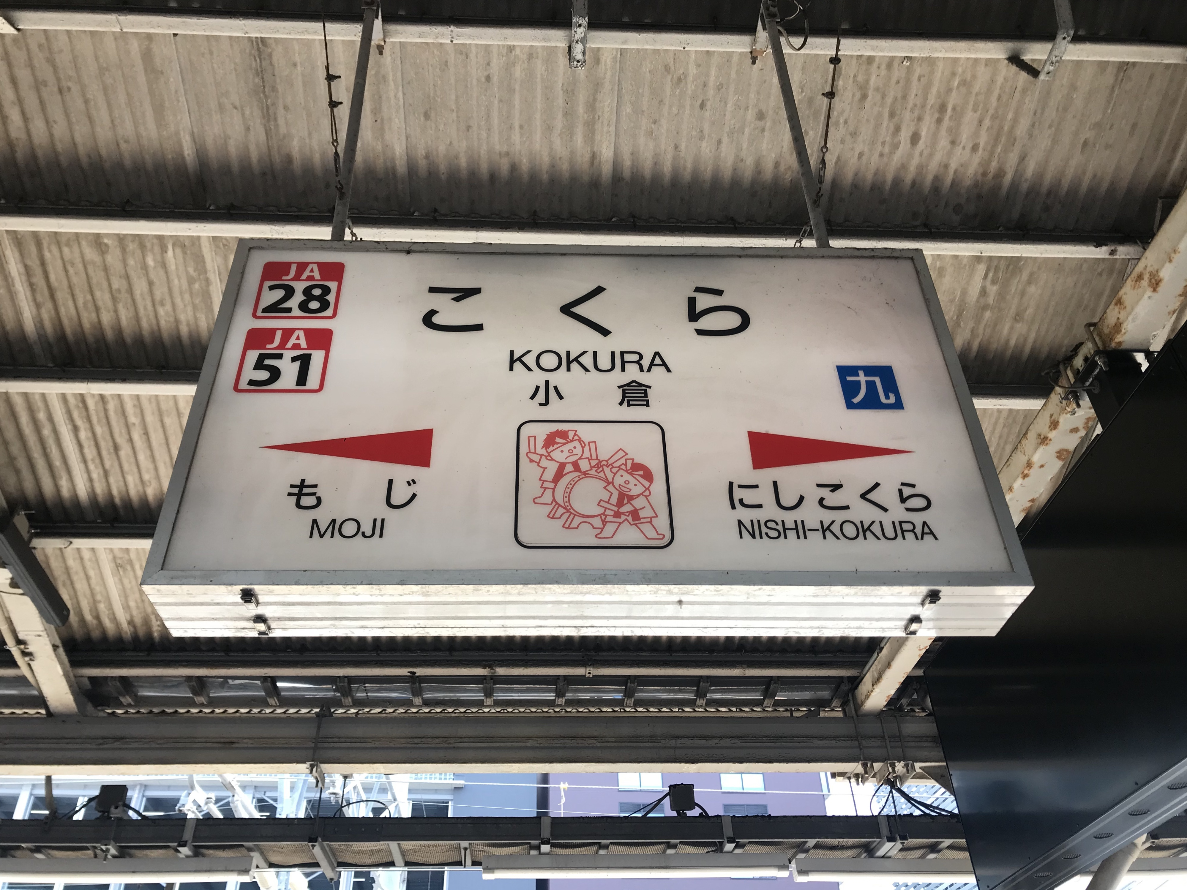 小倉駅(在来線)の駅名標。イラストは小倉祇園太鼓